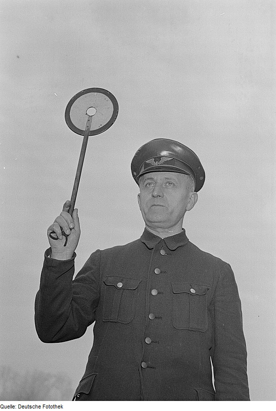 Original image description from the Deutsche Fotothek Porträt eines Schaffners